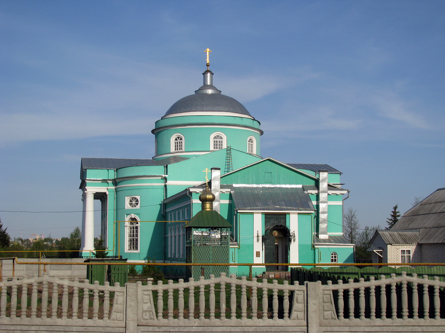 Сергеевский скит Серафимо-Дивеевского женского монастыря, в пос. Выездное